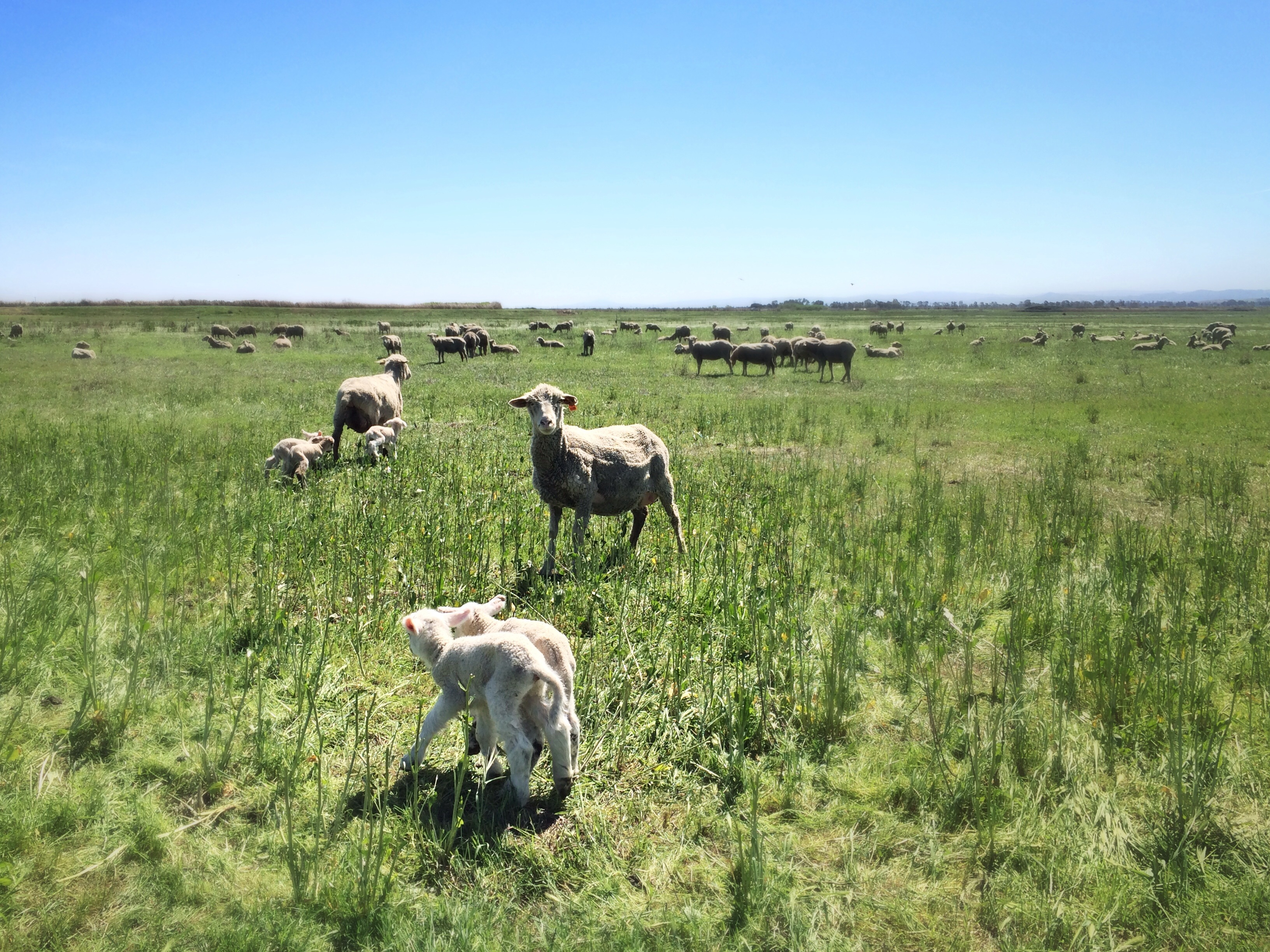 baaaa